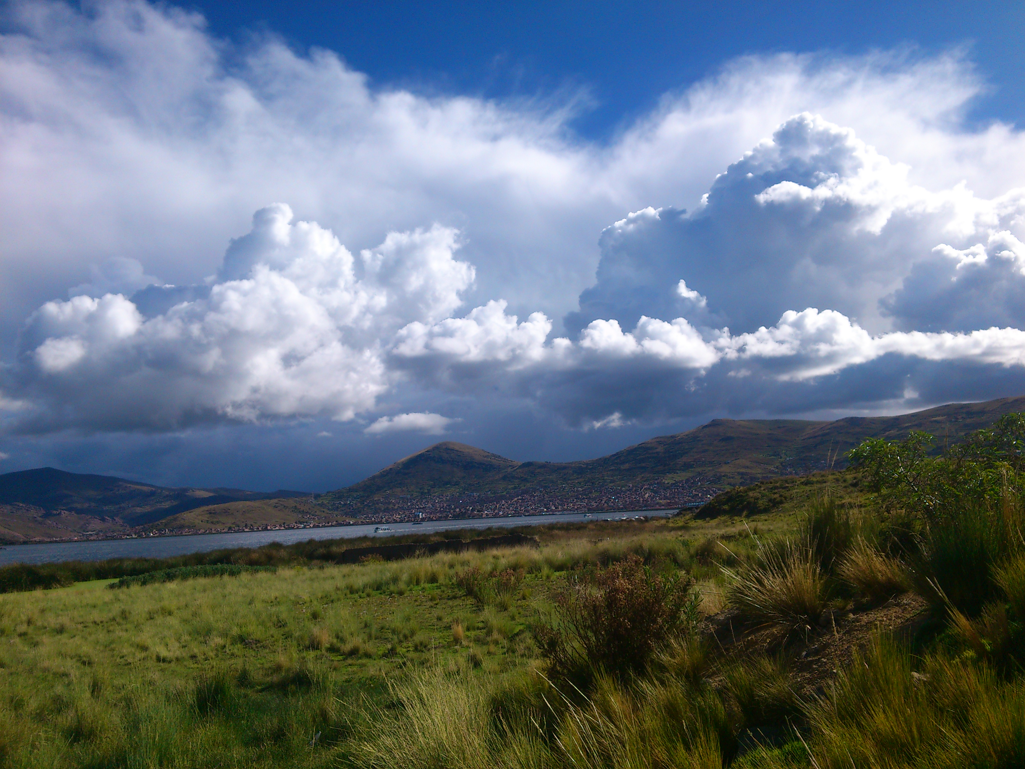 Puno Maravilla Natural